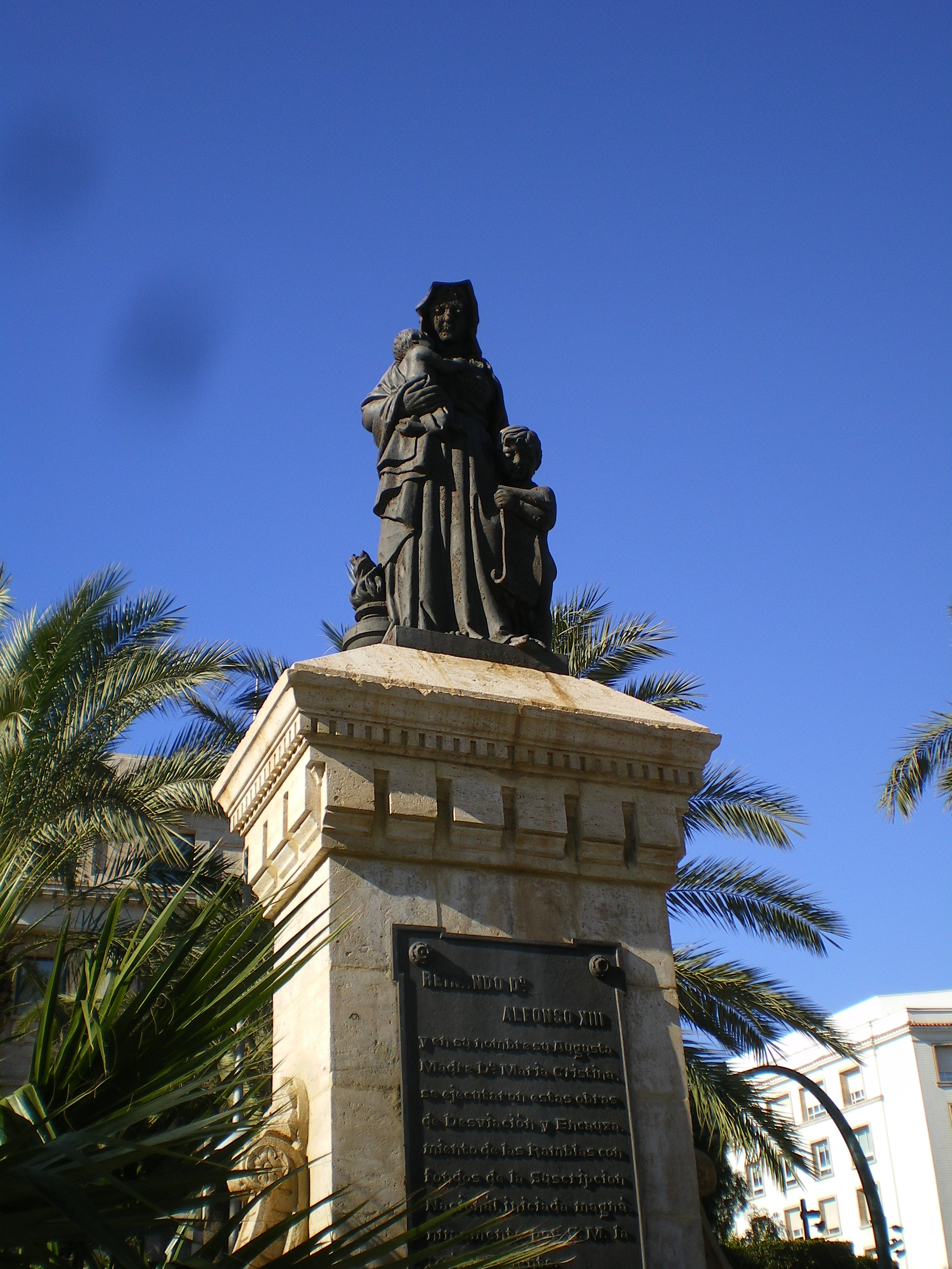 Fotografía de la estatua de la Caridad en Almería, Andalucía, España, erigida en conmemoración de las riadas de finales del s. XIX. Sobre la lápida tras las obras de encauzamiento (1894-1897).